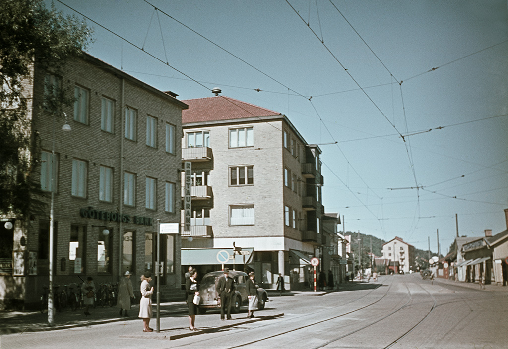 Buildings and people at Göteborgsvägen (Gothenburg road). Hus och människor vid Göteborgsvägen. Parish (socken): Mölndal Province (landskap): Västergötland Municipality (kommun): Mölndal County (län): Västra Götaland Photograph by: Fredrik Bruno Date: 1945 Format: Colour slide Persistent URL: Read more about the photo database (in english)